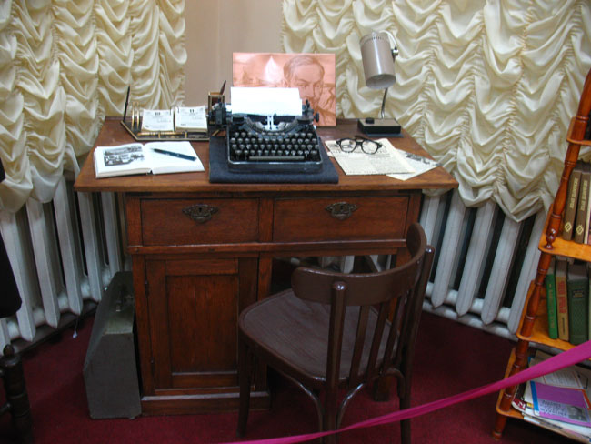 Добруш. Добрушскі раённы краязнаўчы музей. Працоўны стол Івана Шамякіна